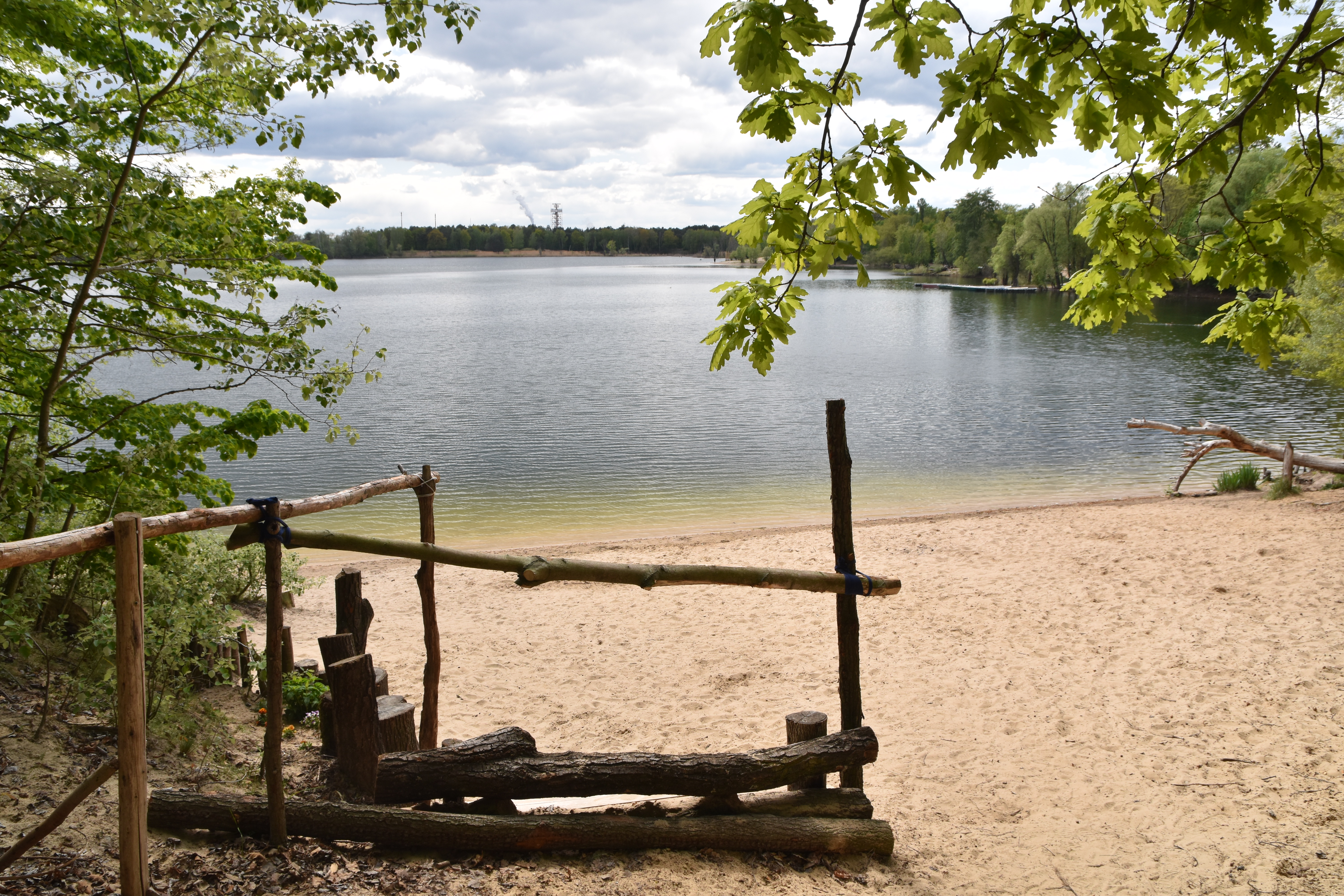 Blick auf den FKK-Strand am Flughafensee (Landschaftsschutzgebiet in Berlin).